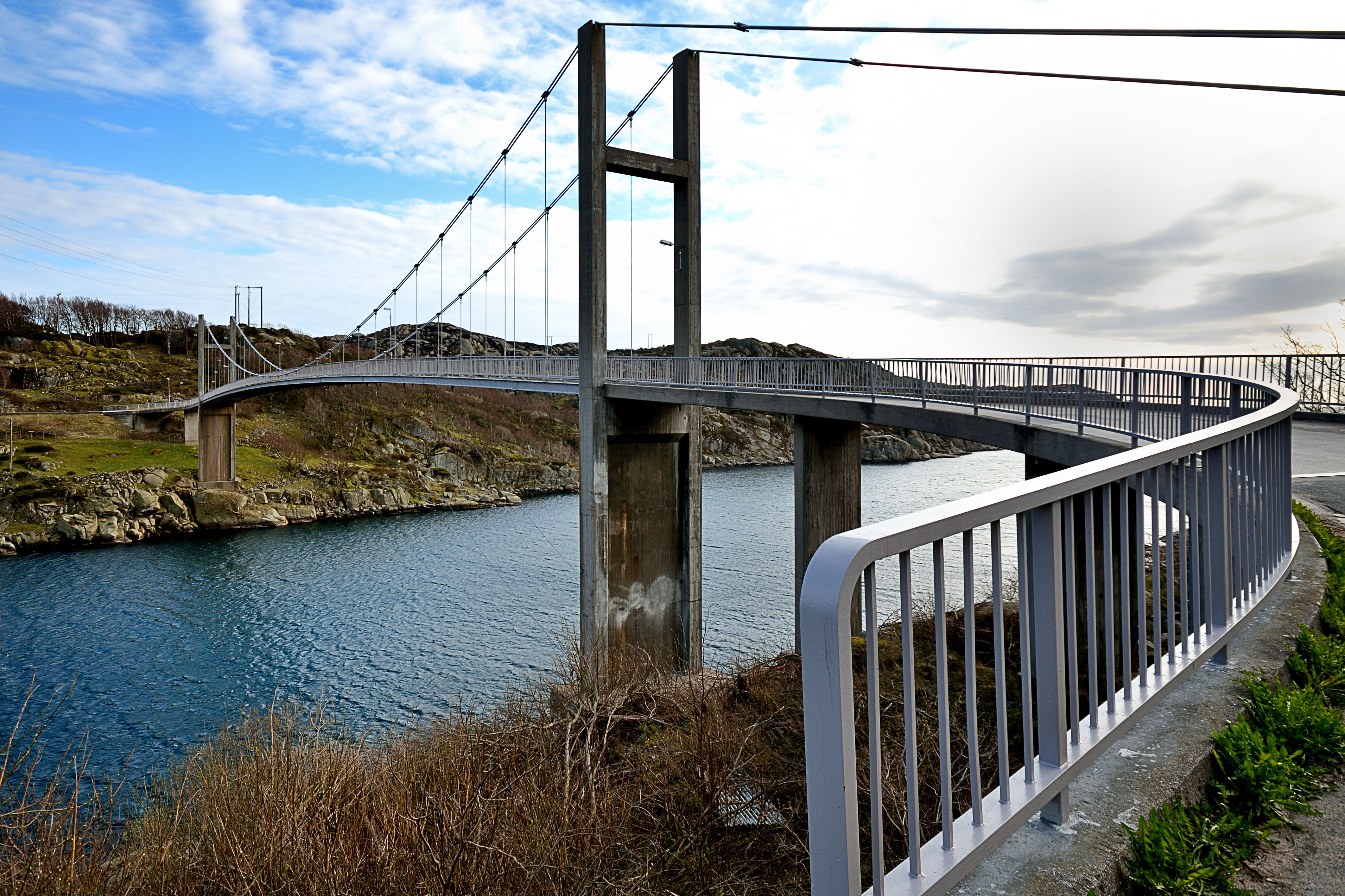 Revøysundbroa i Lyngdal kommune, Vest-Agder